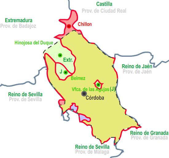 TERRITORIOS Fregenal - Pérdida Grazalema - Incroporación Nuevas Poblaciones de Andalucía y Sierra Morena Reino de Sevilla Reino anterior a 1833 Prov. de Málaga Provincia nueva de 1833 Ext: Extremadura J: Jaén - - - Límite de la provincia __ Límite del antiguo reino